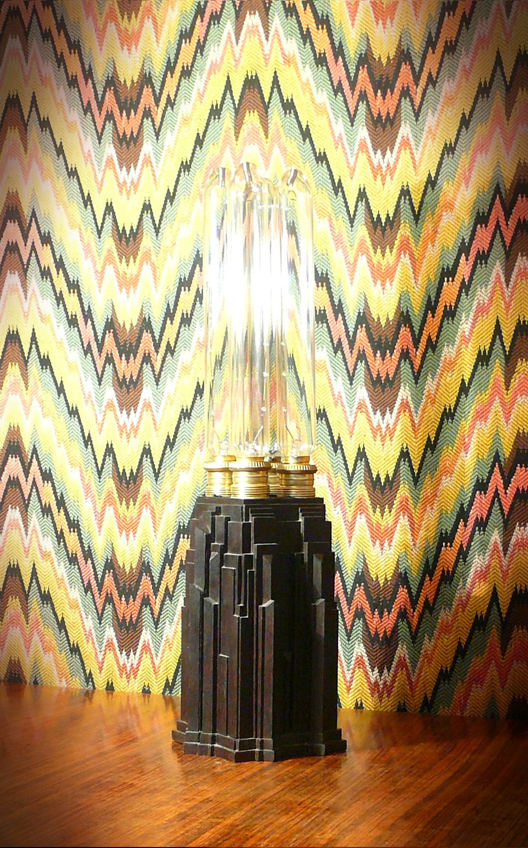 Arnaldo Dell'Ira (1903-1943), lampada "a grattacielo", prototipo in legno laccato, 1929. Collezione Archivio Dell'Ira.